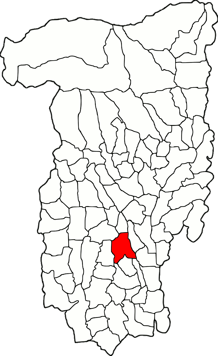 Lage der Gemeinde Glăvile im Kreis Vâlcea (RO).